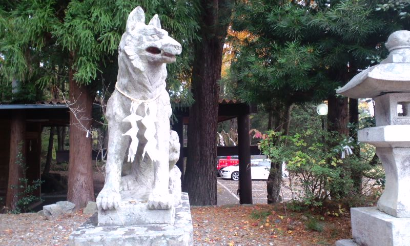 虎捕山 山津見神社拝殿の狼